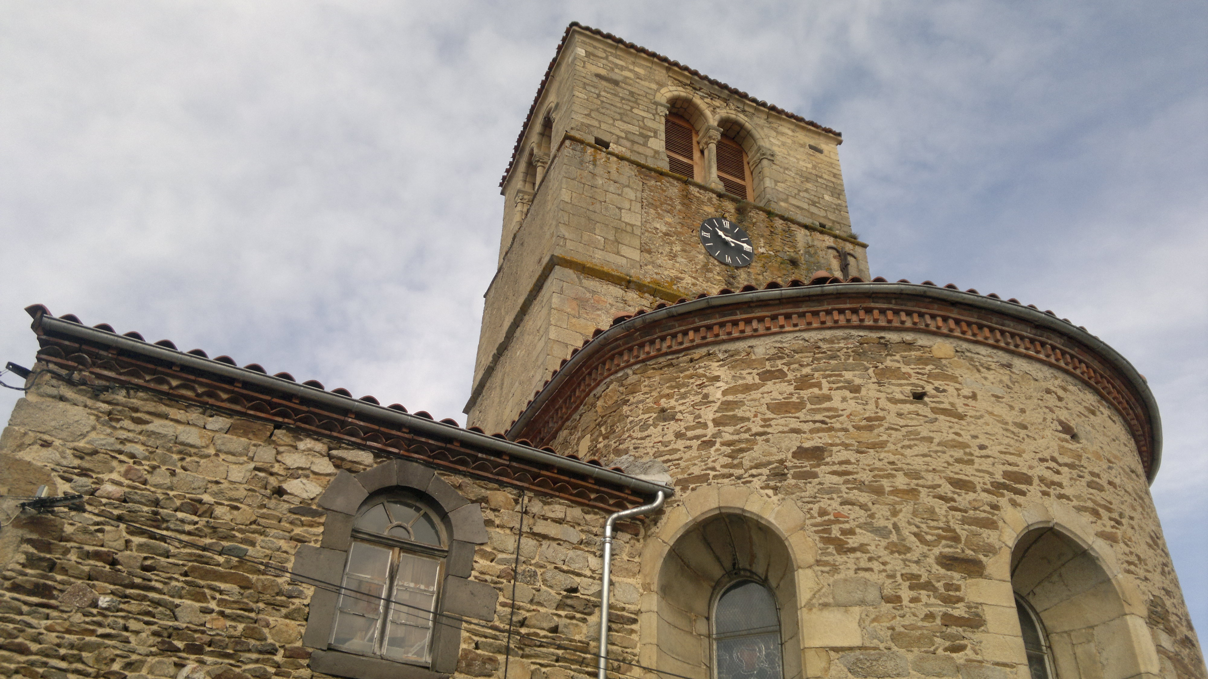 L'église paroissiale Saint-Pierre à Champagnac-le-Vieux. Commune française, située dans le département de la Haute-Loire et la région Auvergne.